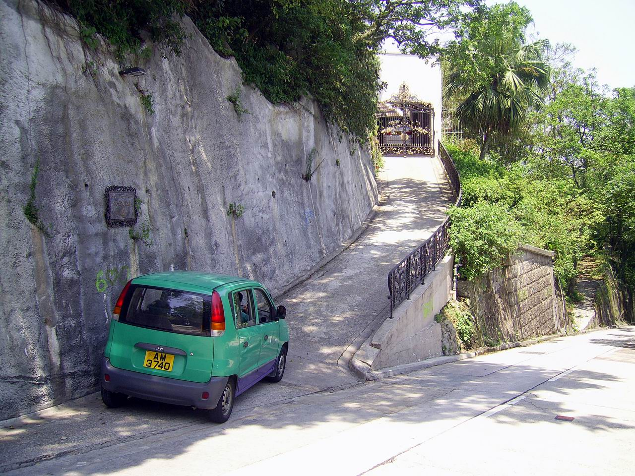 一名郵差駕駛小型郵政車在山頂區排派遞郵件